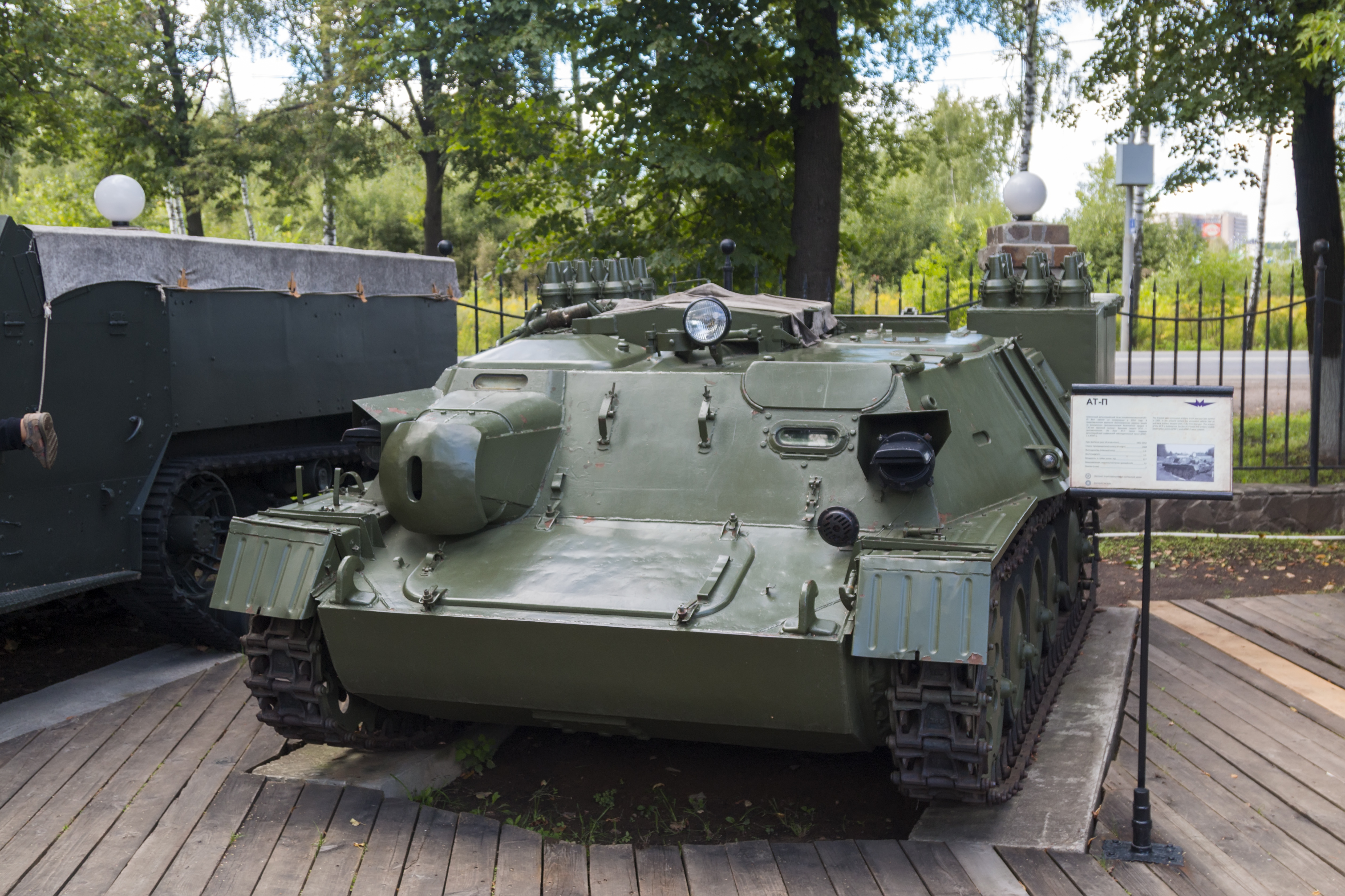 Полубронированный артиллерийский тягач АТ-П.